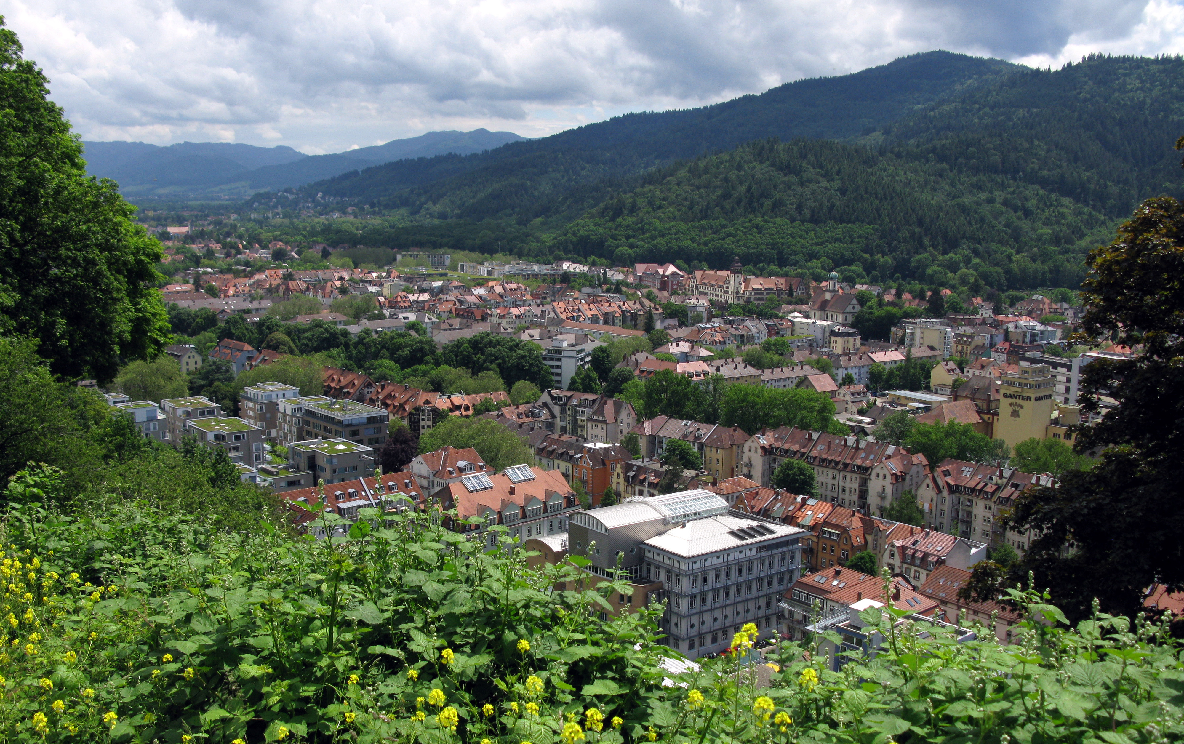 Blick von der Ludwigshöhe auf dem Schlossberg auf Freiburg-Oberau, im Vordergrund das SWR Studio